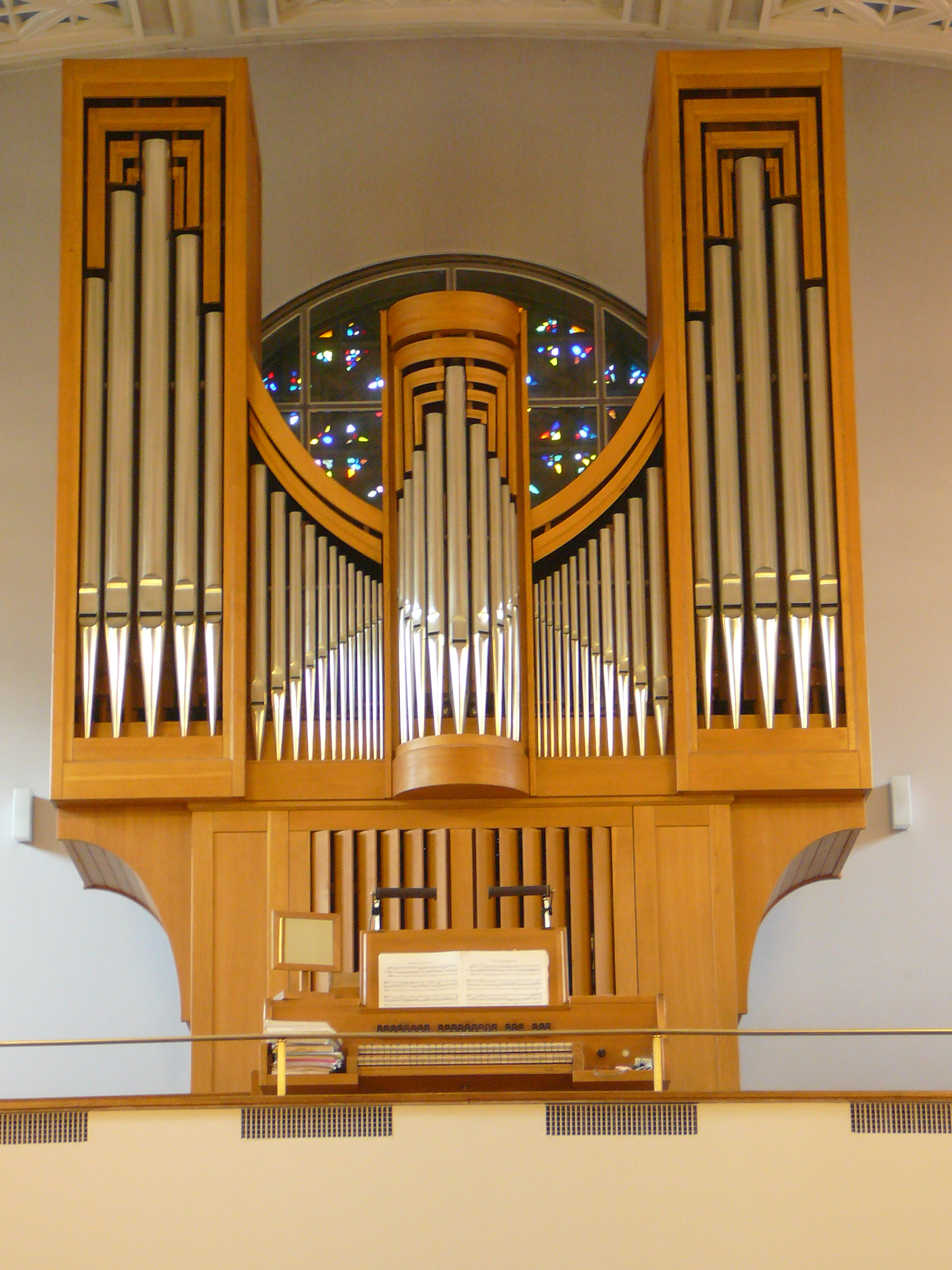 Römisch-katholische Kirche Don Bosco Zürich-Aussersihl, Späth-Orgel